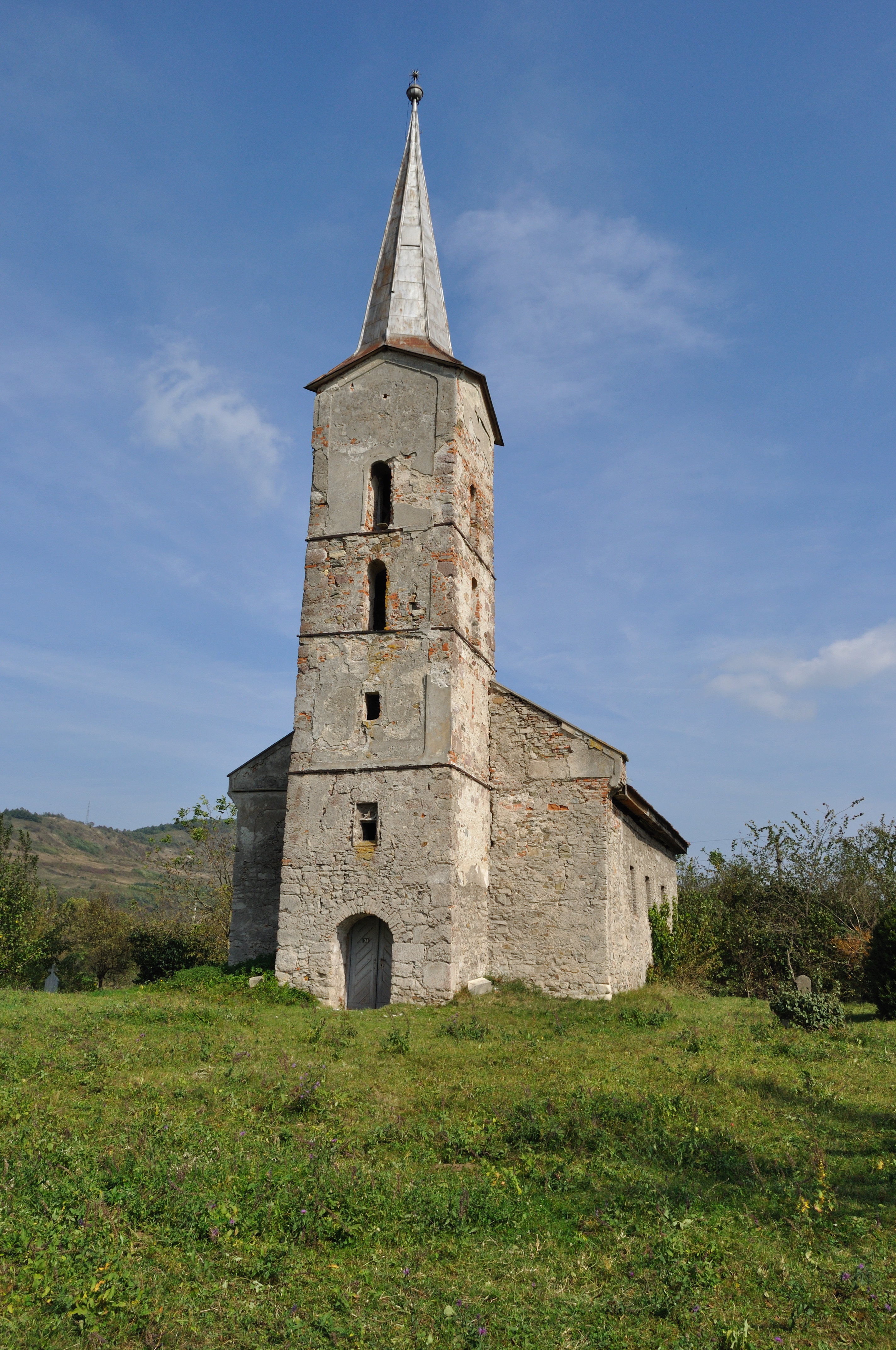 Biserica reformată din Mintia, județul Hunedoara